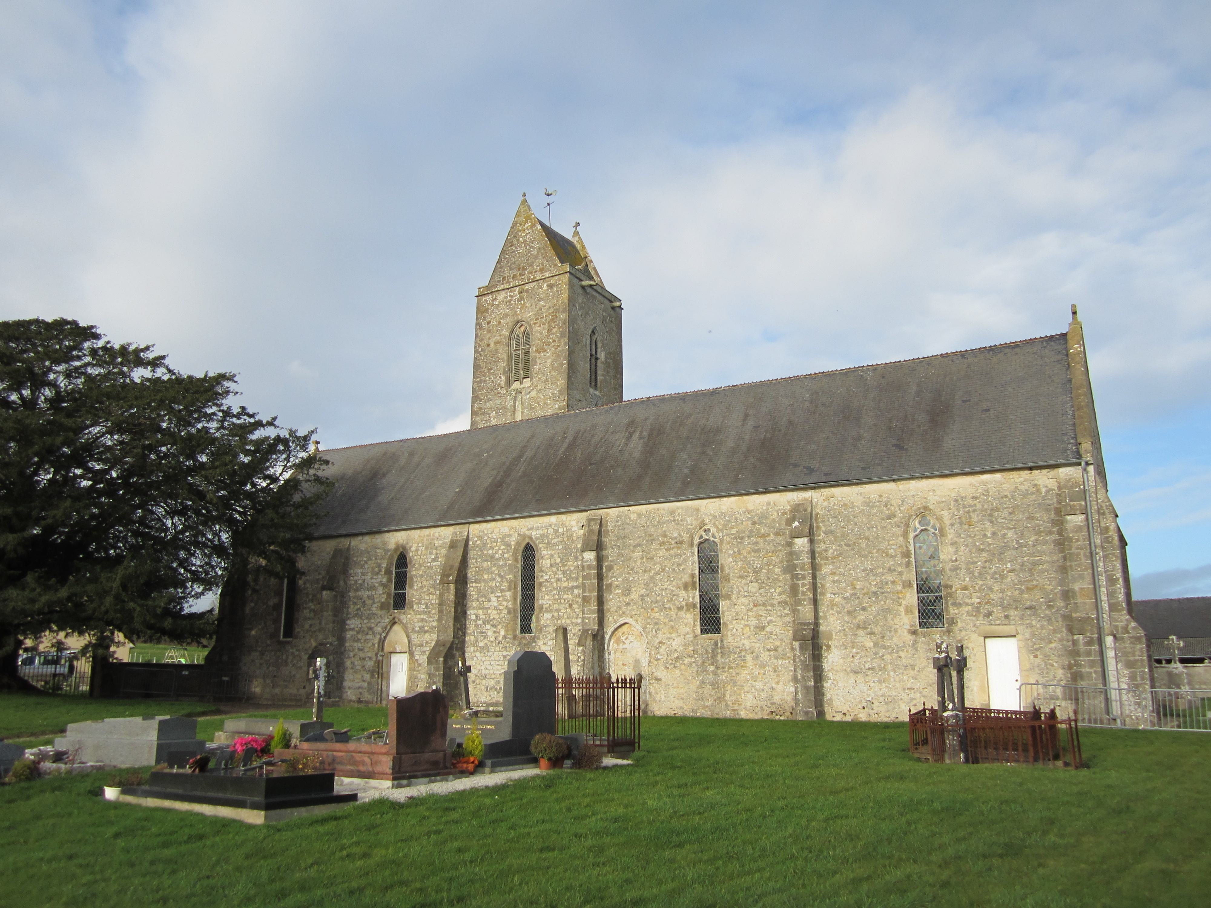 Église Saint-Laurent d'Écoquenéauville